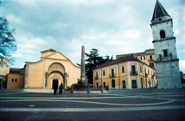 Piazza Giacomo Matteotti a Benevento, con la chiesa di Santa Sofia